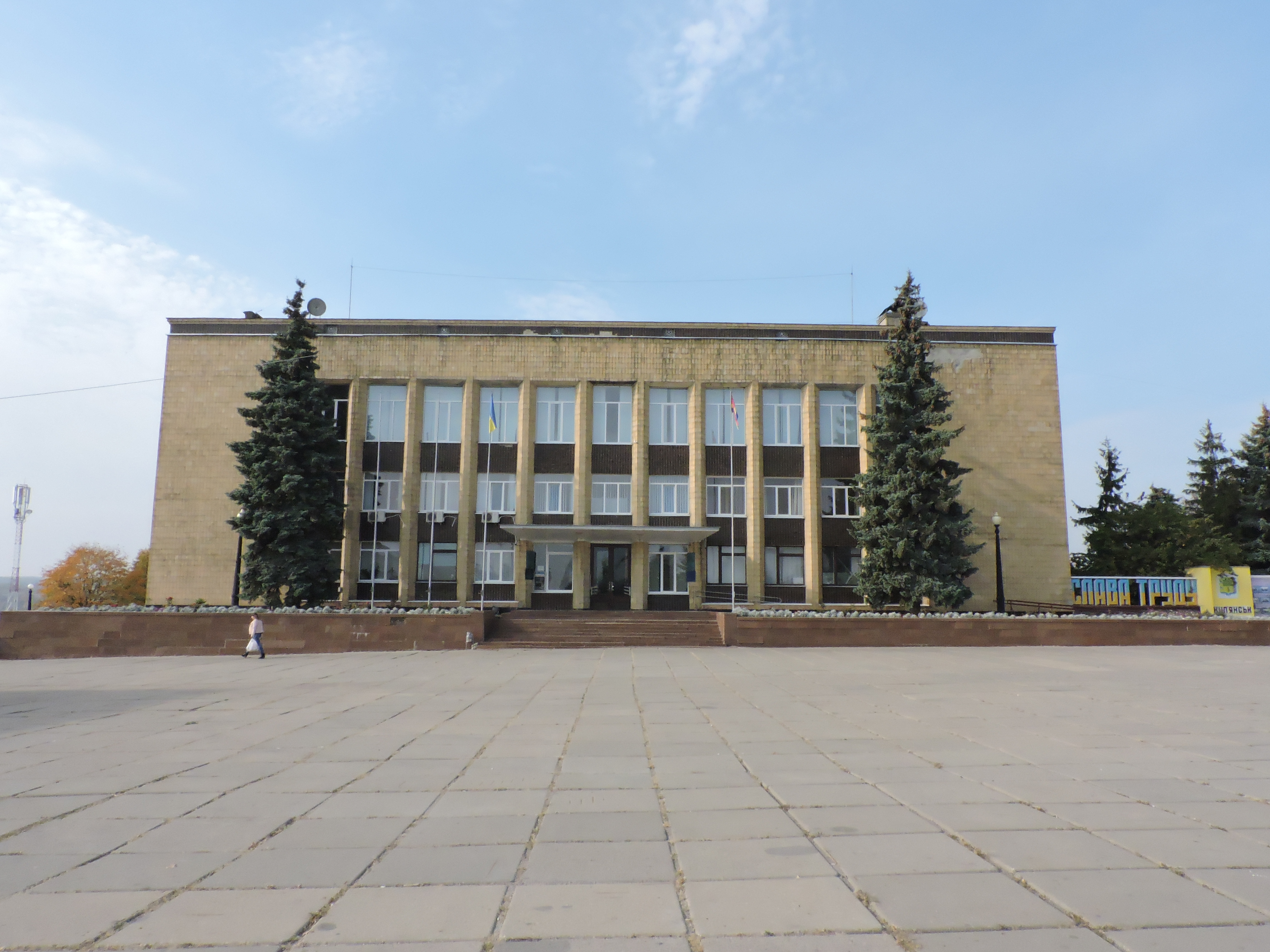 Головна адміністративна будівля у м. Куп'янськ, в якій розташовані Куп'янська районна державна адміністрація, Куп'янська районна рада та Куп'янська міська рада. Жовтень 2018 року.